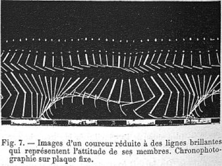 Image chronophotographique d'un coureur (ancêtre du motion capture). Technique inventée par Étienne-Jules Marey vers 1890 et relatée dans une conférence au Collège de France.